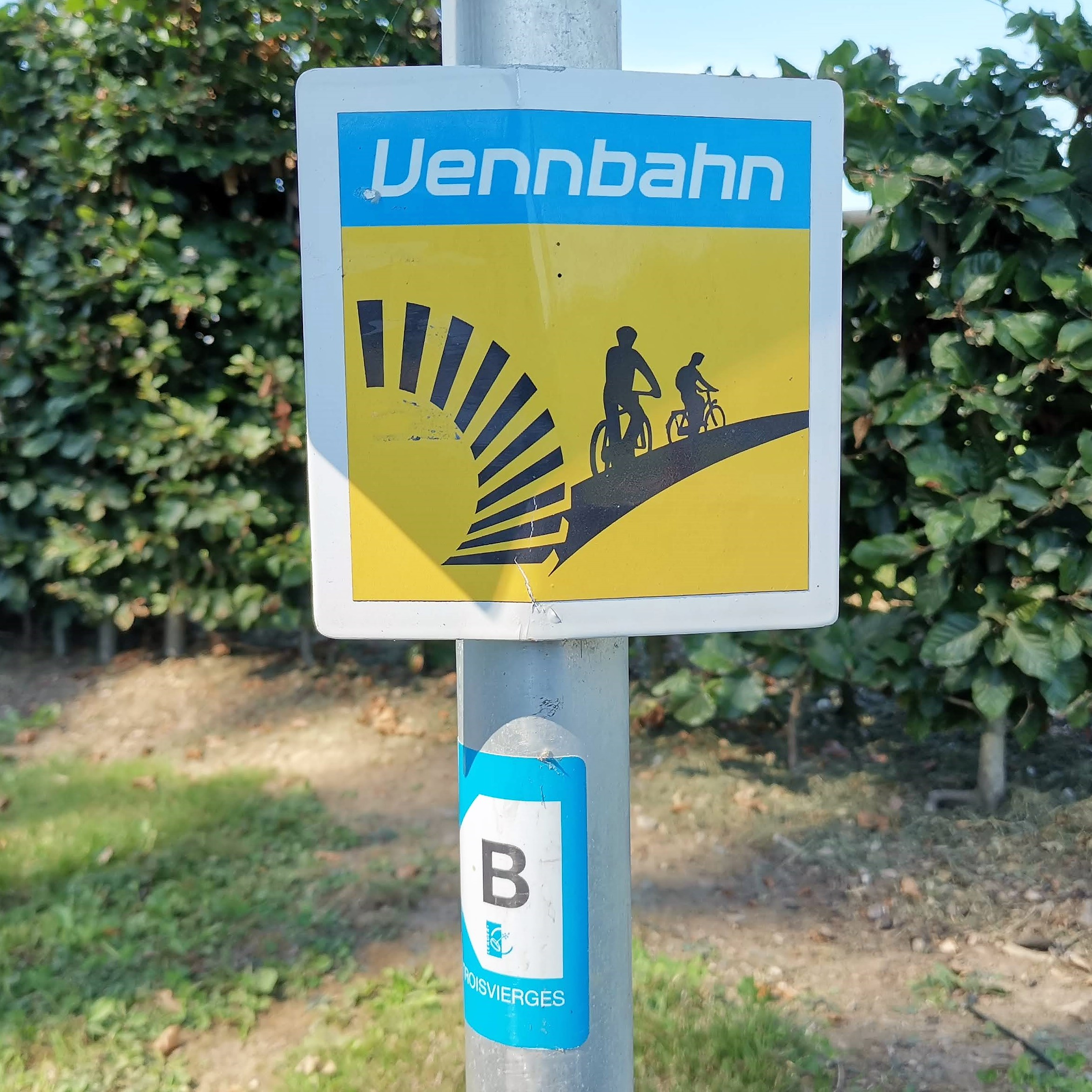 Huldane, Buergplaz. Panneau Vennbahn.